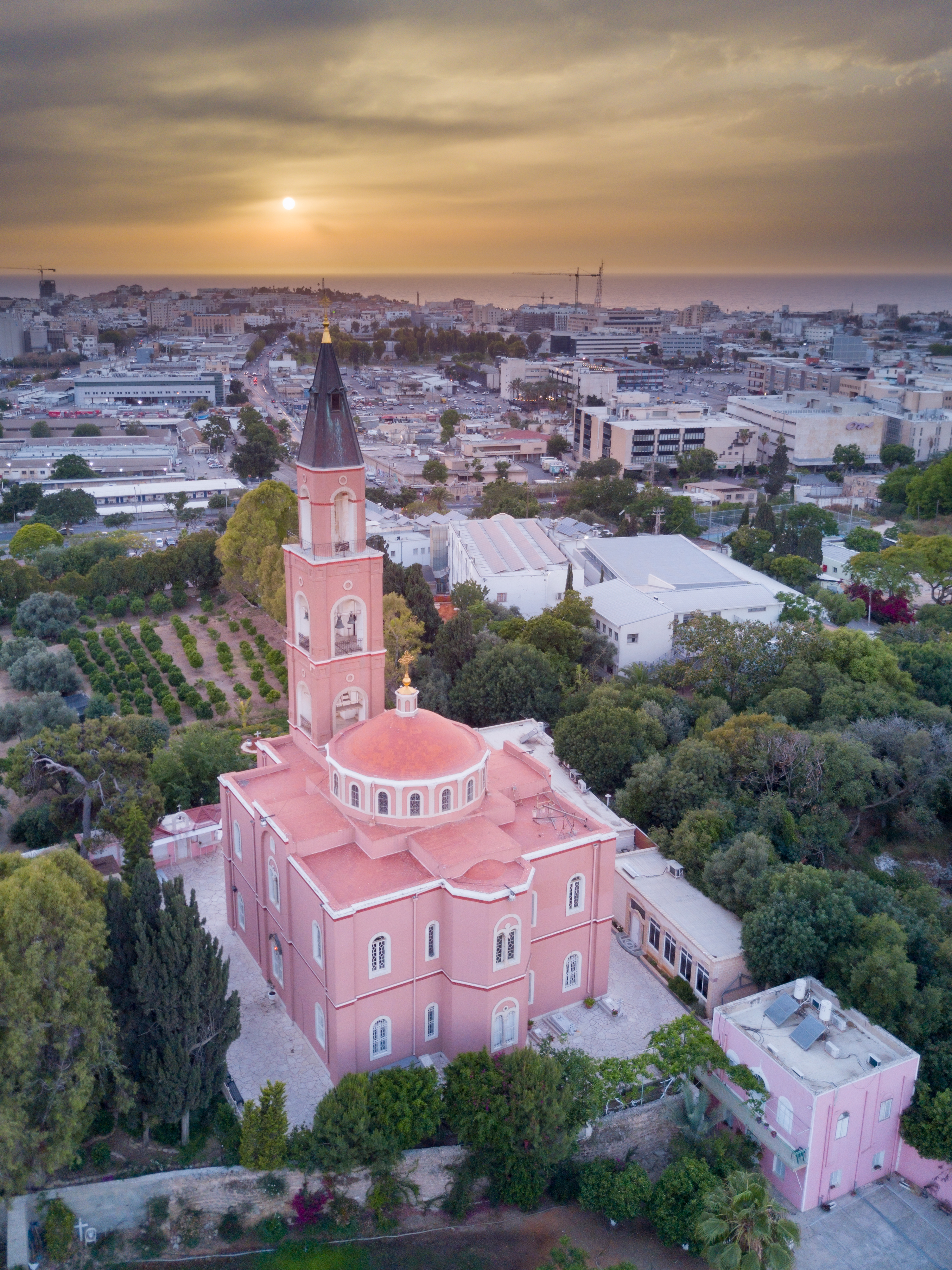 כנסיית פטרוס הקדוש, או הכנסייה הרוסית, היא כנסייה רוסית פרבוסלבית השוכנת באבו כביר בדרומה של תל אביב. הכנסייה נקראת על שמו של השליח פטרוס הקדוש, ולפי המסורת הרוסית-פרבוסלבית, במקום זה ניצב בית שמעון הבורסקאי, בו התארח פטרוס עת שהה ביפו. מסורת זו ממשיכה וגורסת כי בחלקת הקברים הצמודה לכנסייה, נקברה גם טאביתא, אותה הקים פטרוס מן המתים.